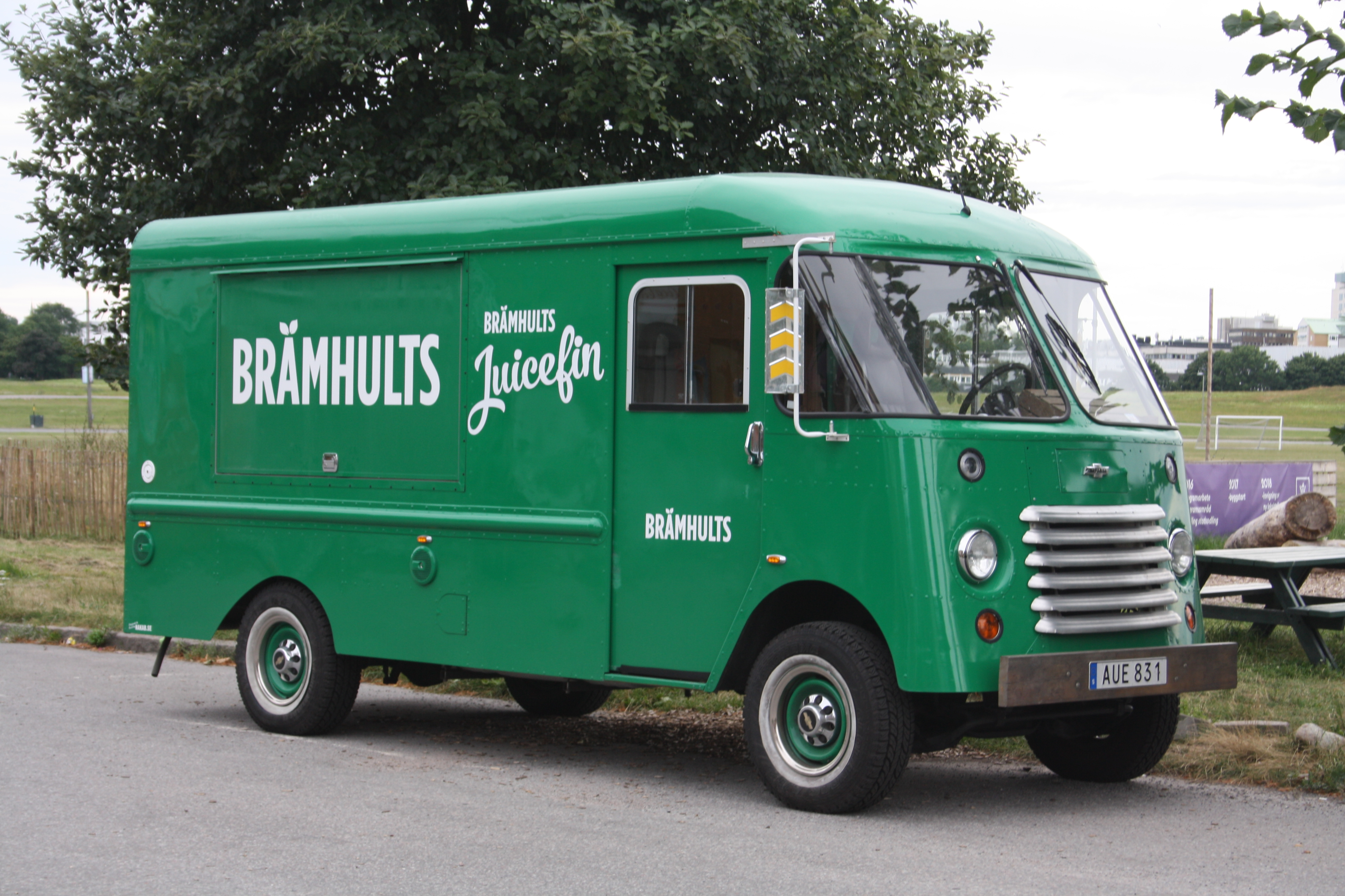 Bil från Brämhults